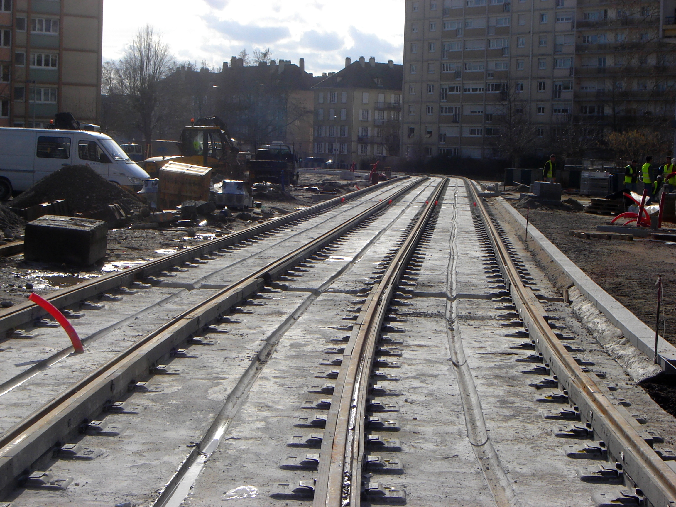 Chantier des extensions tram 2007 - 2008, en aout 2006